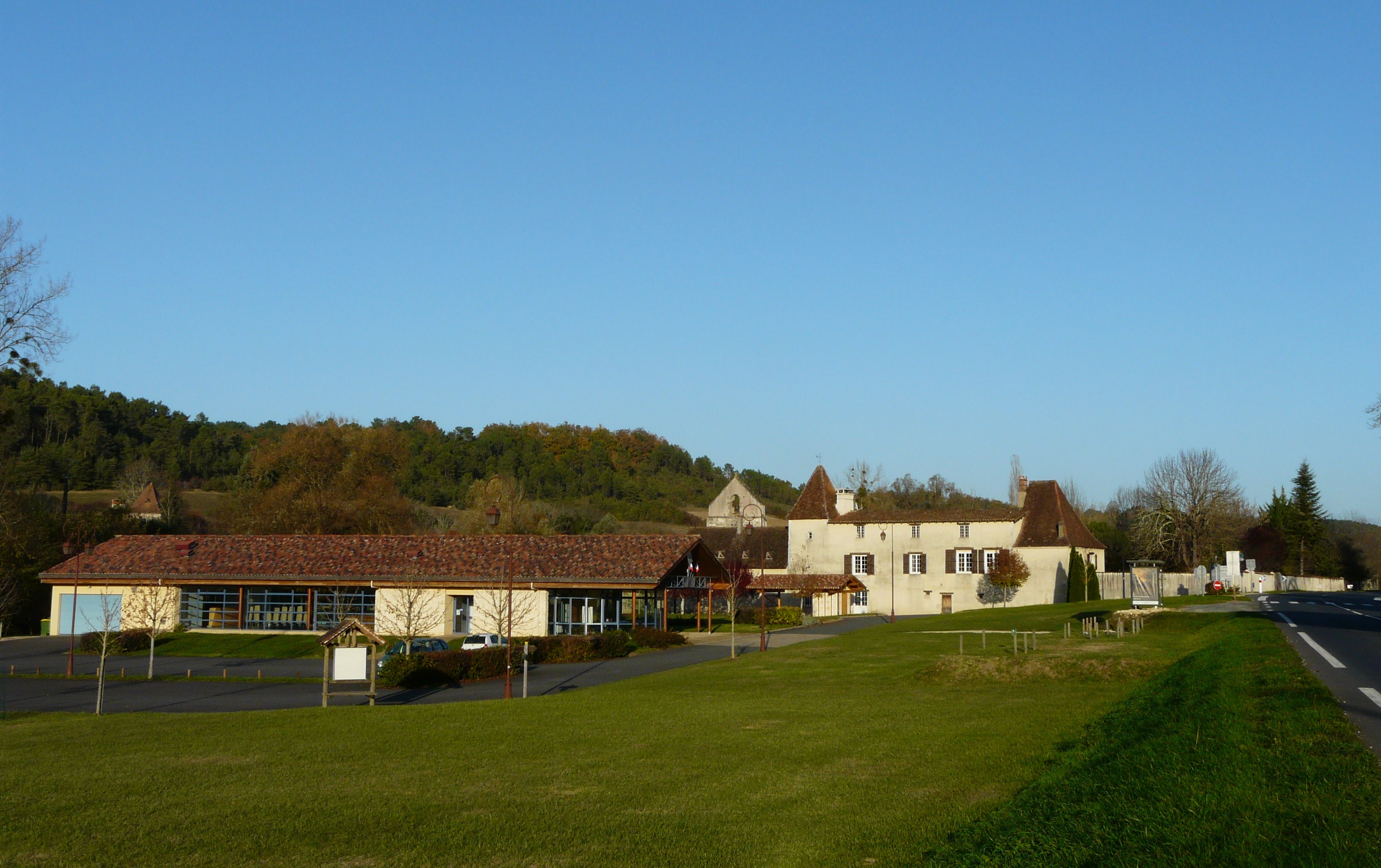 Le village de Saint-Crépin-d'Auberoche, Dordogne, France.